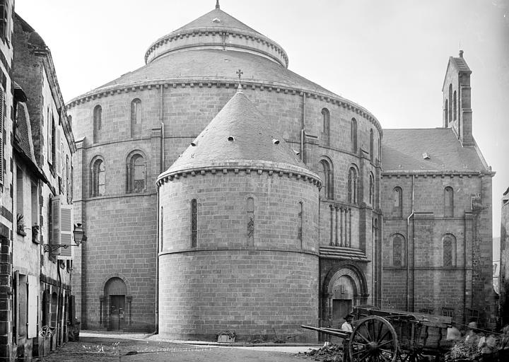 Façade Nord de l'église Sainte-Croix de Quimperlé.